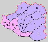 兵庫県明石郡の町村制時点の町村。